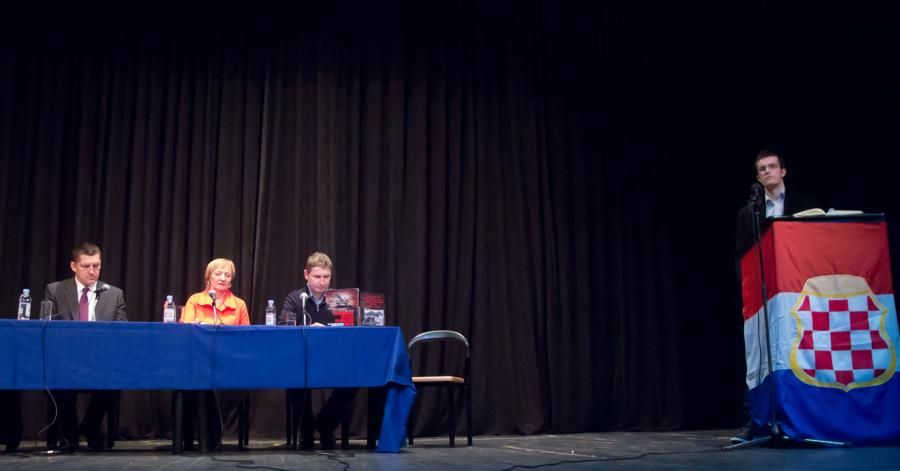 Javna tribina: Je li Hrvatska agresor, a Herceg Bosna dio udruženog zločinačkog pothvata?" Ante Nazor, Ivica Lučić, Višnja Starešina.